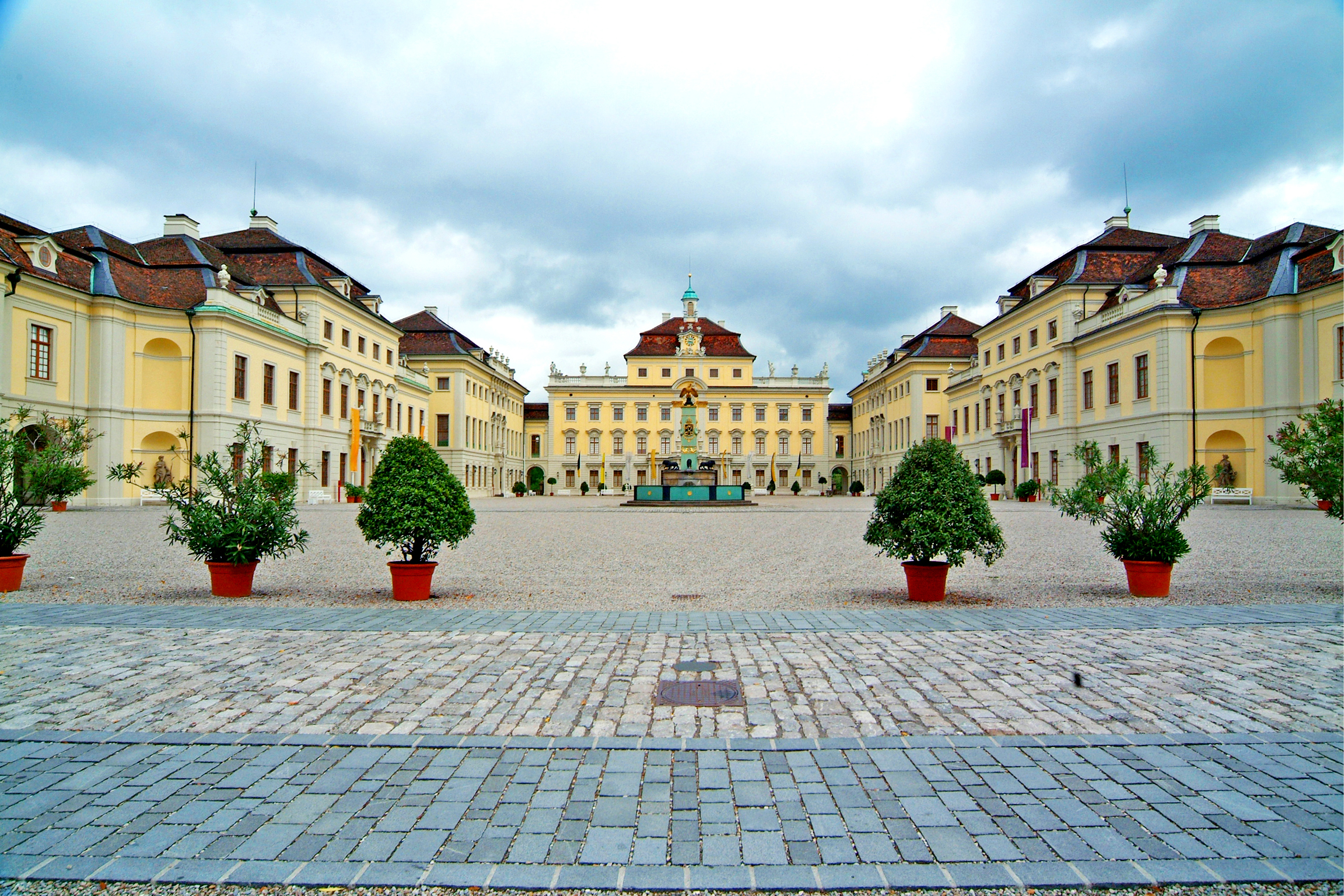 CASTELLO DI LUDWISBURG